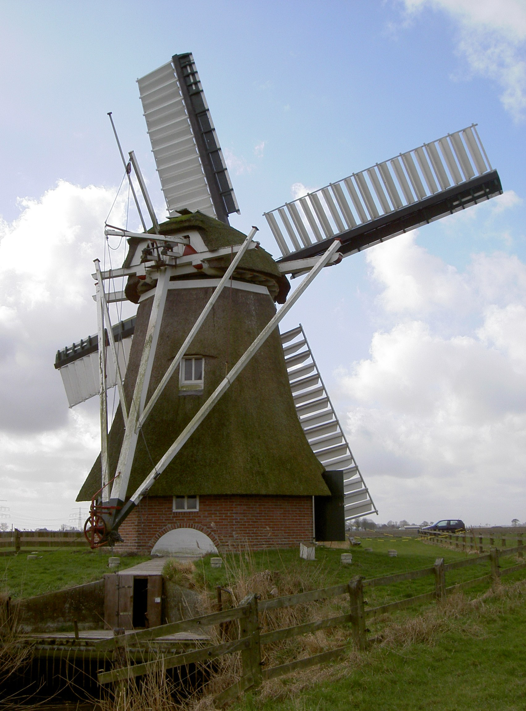 Een poldermolen gebouwd in 1876 en verplaatst in 1882 naar de huidige plaats.